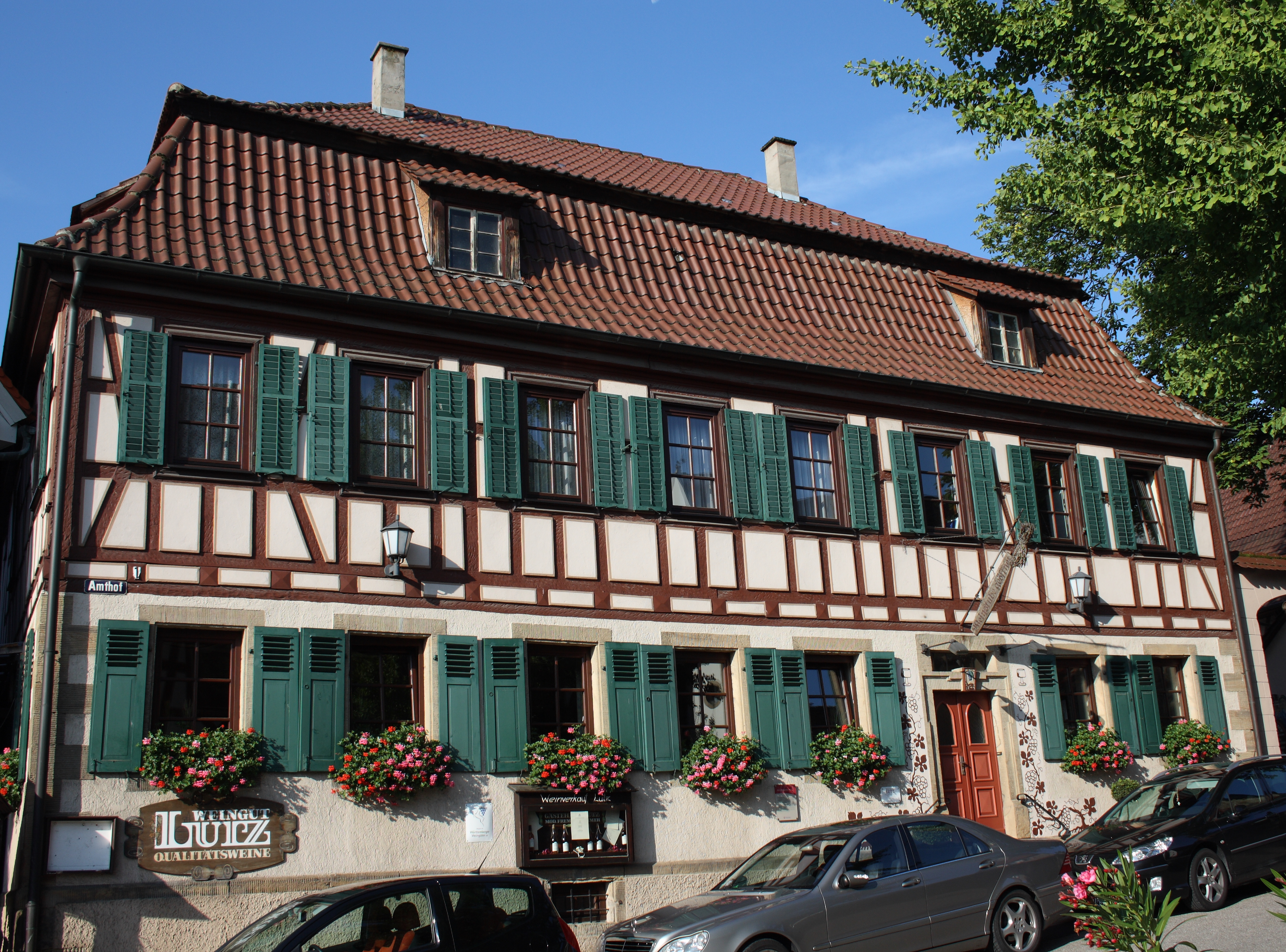 Amthof in Oberderdingen: ehemalige Amtsschreiberei, heute Weingut LUTZ